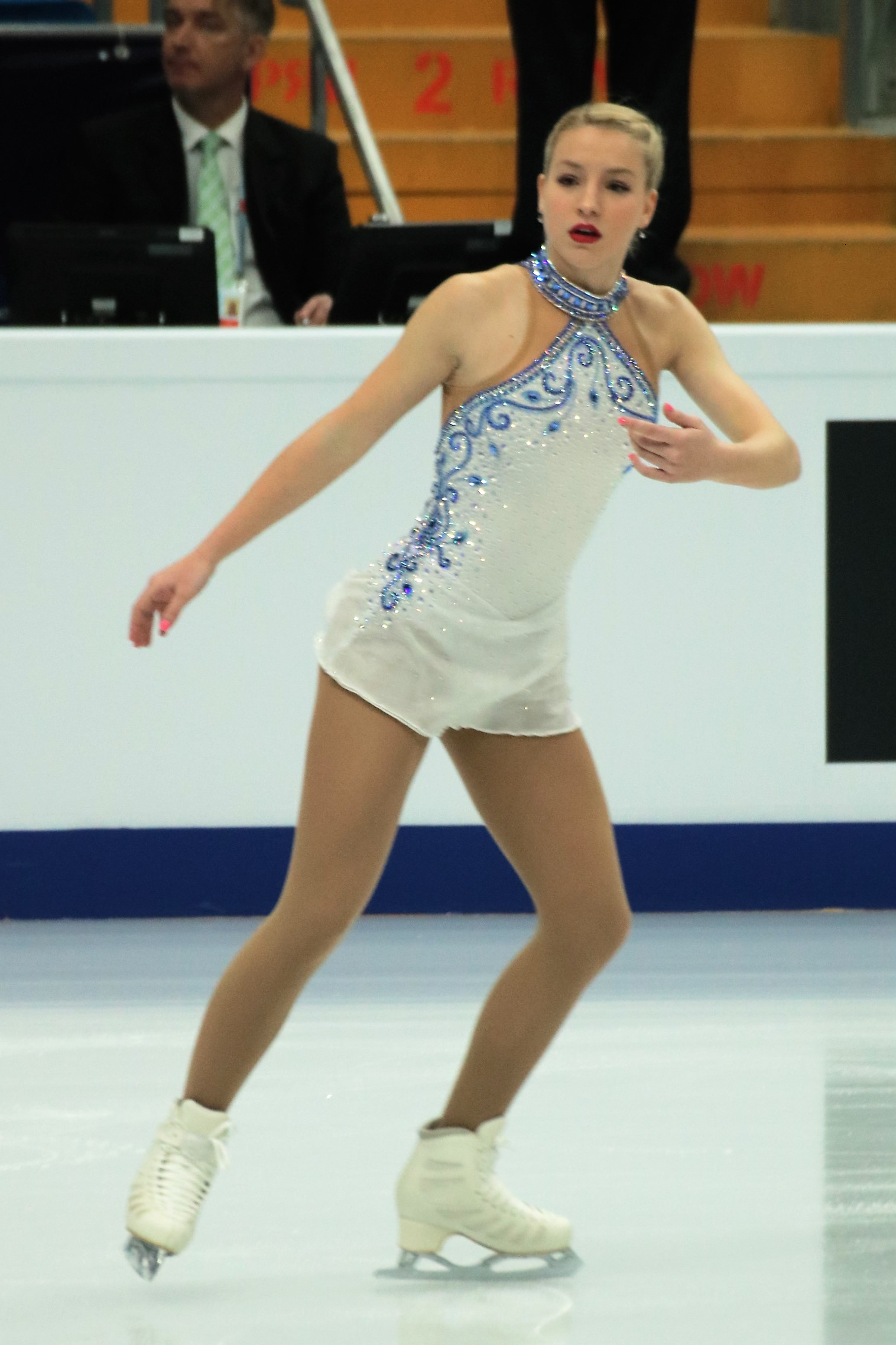 Сильвия Хугеч (Словакия) на Чемпионате Европы по фигурному катанию 2018.